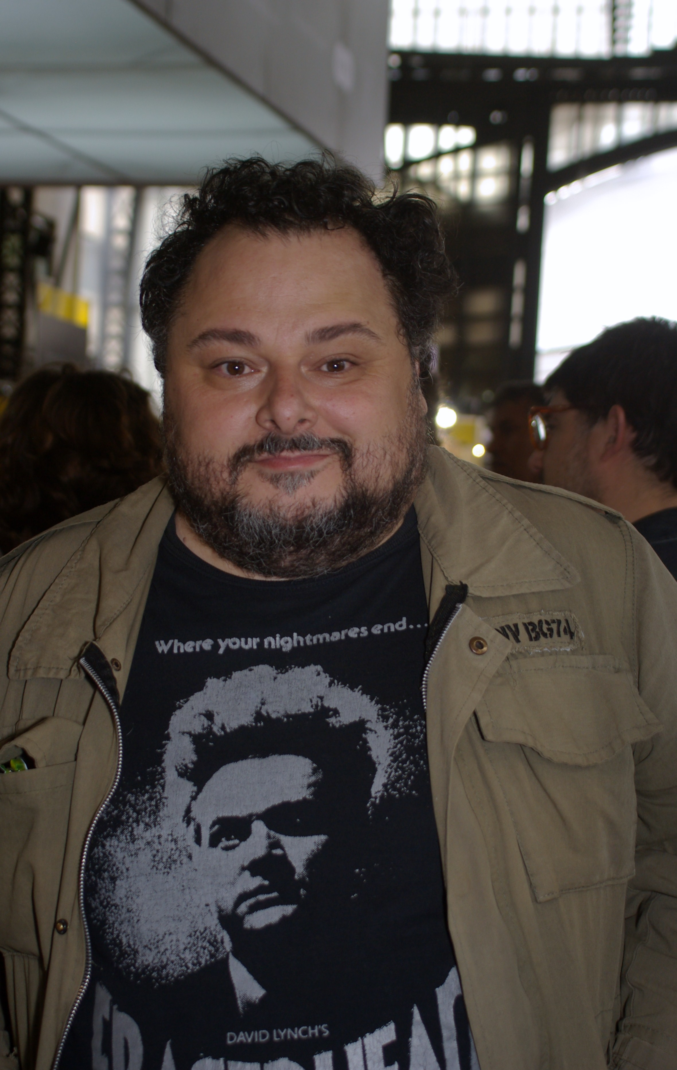 El escritor chileno Álvaro Bisama en la Feria Internacional del Libro de Santiago 2015